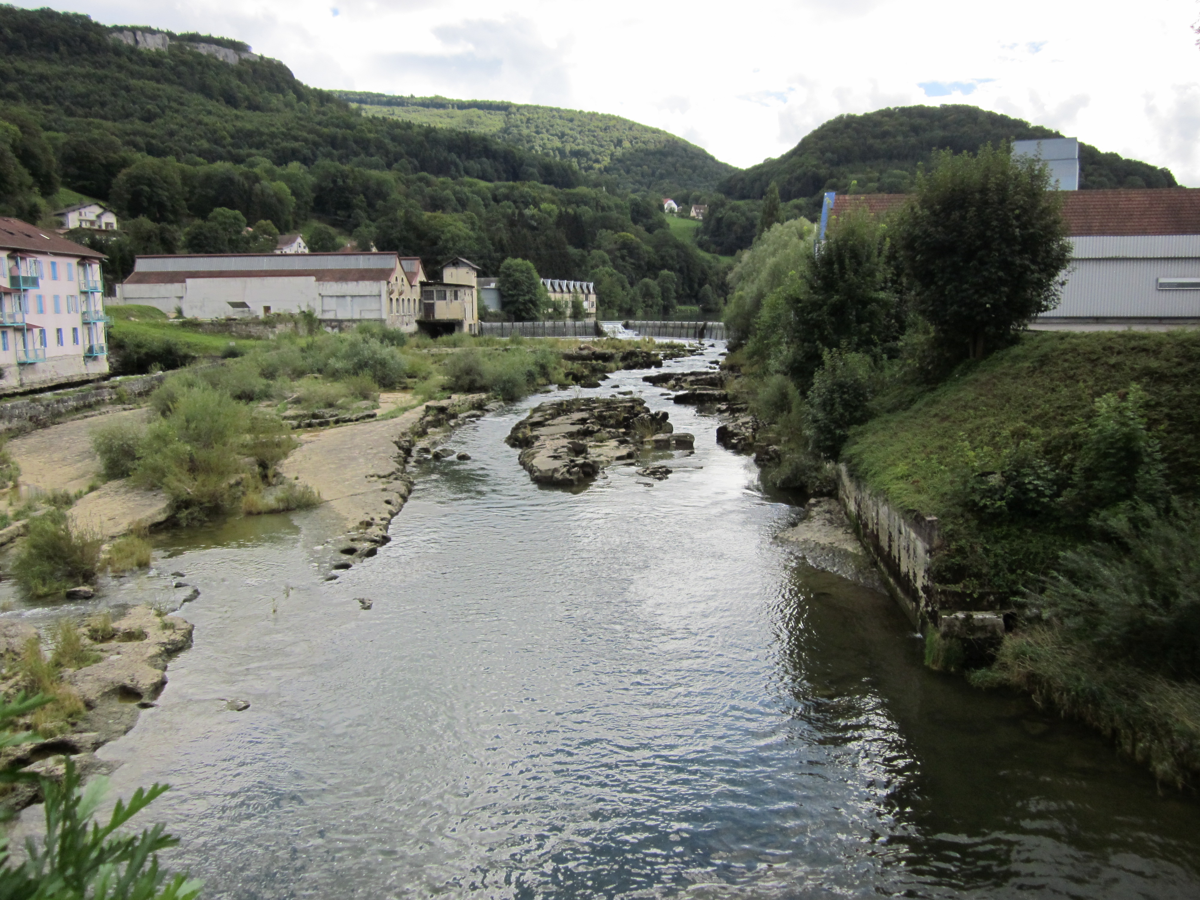 Pont-de-Roide - le Doubs et les usines